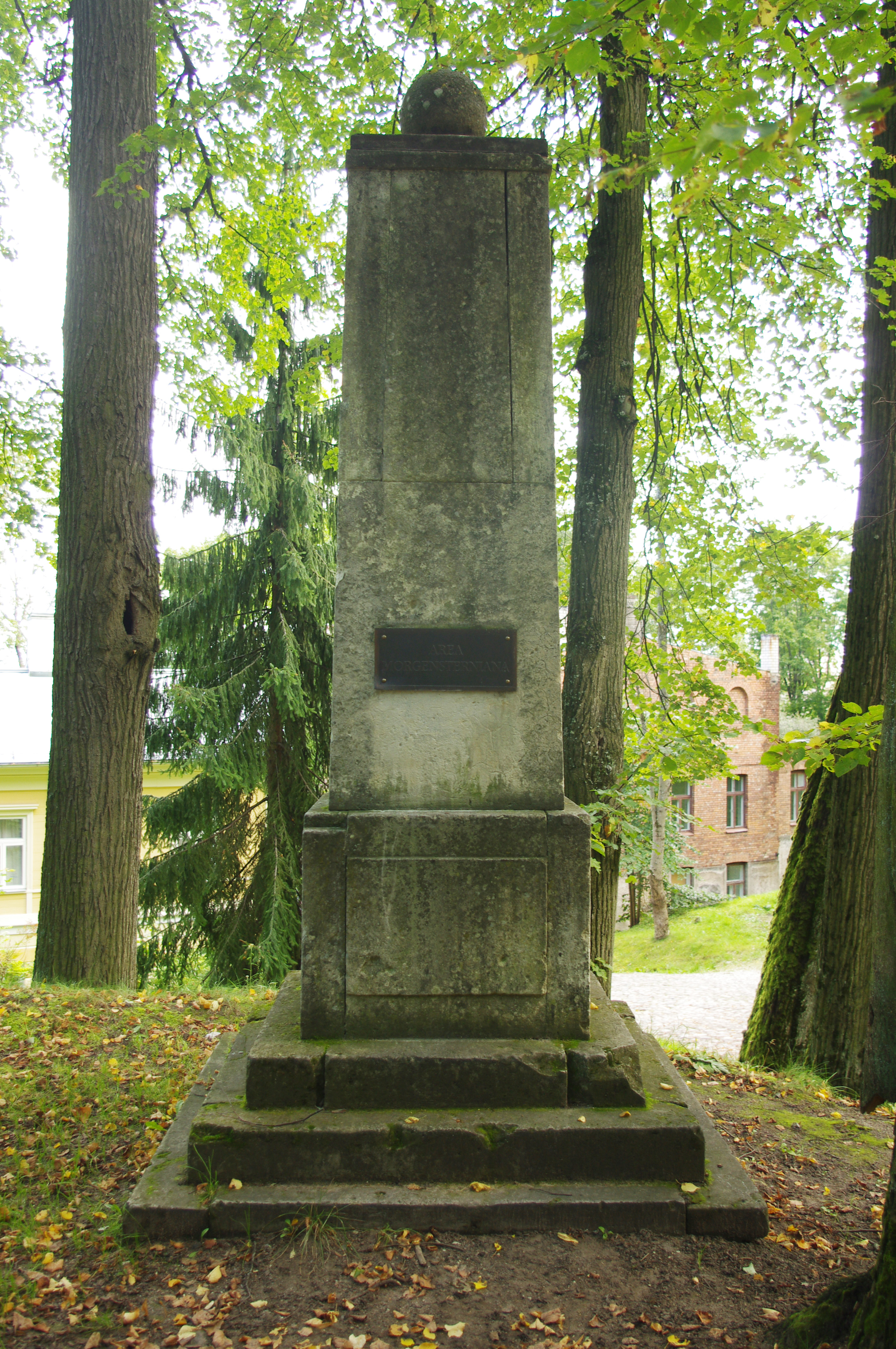 Johann Karl Simon Morgensterni mälestussammas